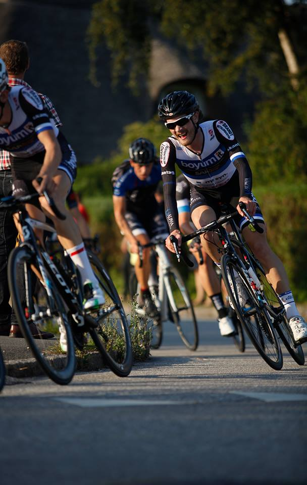 Løb1